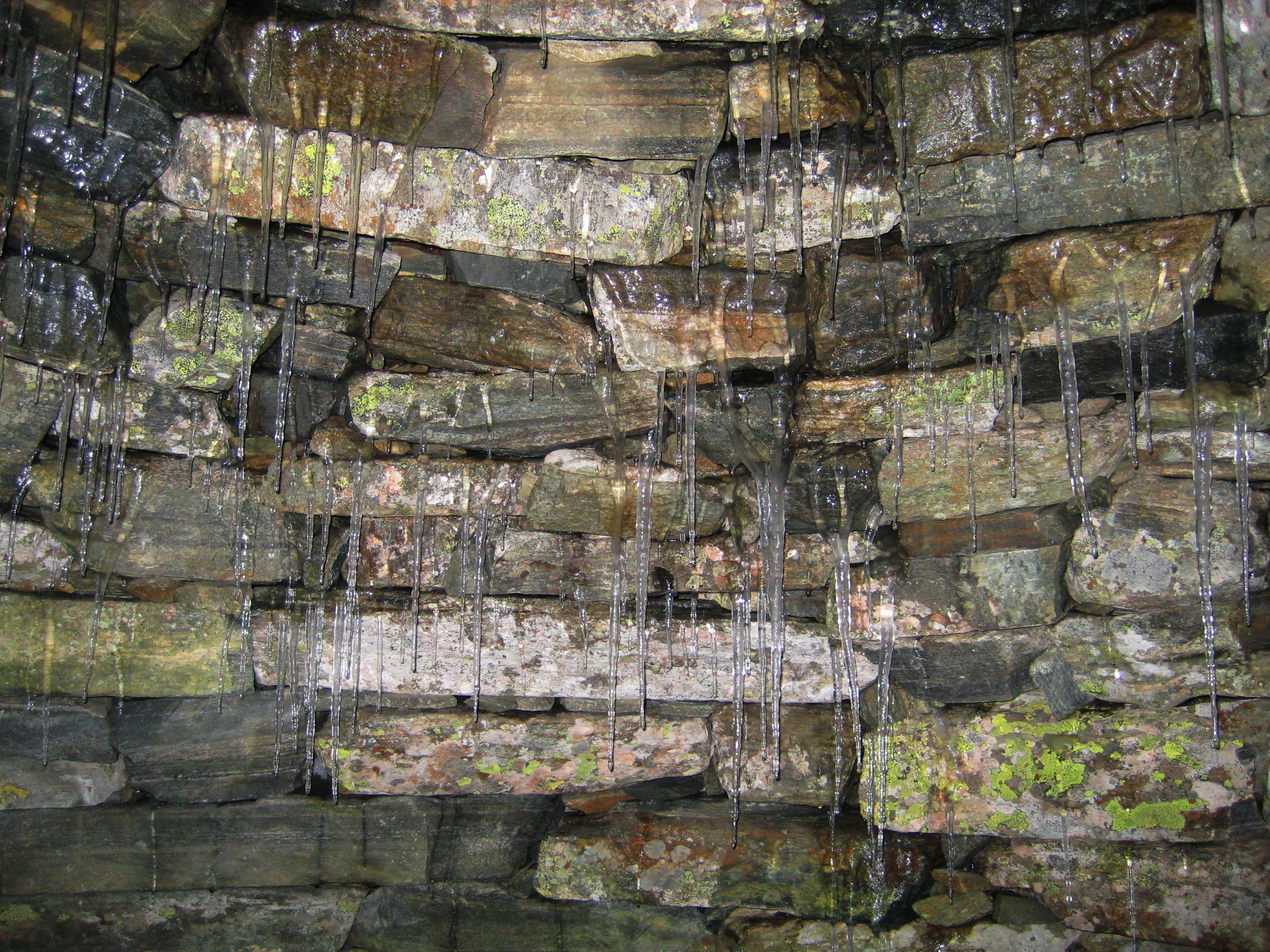 Die vereiste Kuppel von innen des Apollontempel am Hundstalsee (Österreich) aufgenommen am 08.05.2008. Es ist Frühling, doch auf 2289 m über dem Meer herrscht noch tiefster Winter und Eiseskälte.